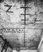 Traces de la méridienne antique ; l'inscription calendaire signifierait : "lorsque les vents étésiens arrêtent de souffler" , d'après Buchner, 1982.